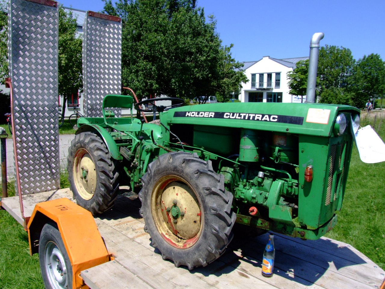 Holder Cultitrac AM2 mit 20 PS